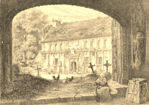 L'ossuaire de Pencran en 1865 (dessin publié dans la revue "Le Monde illustré" du 16 septembre 1865)